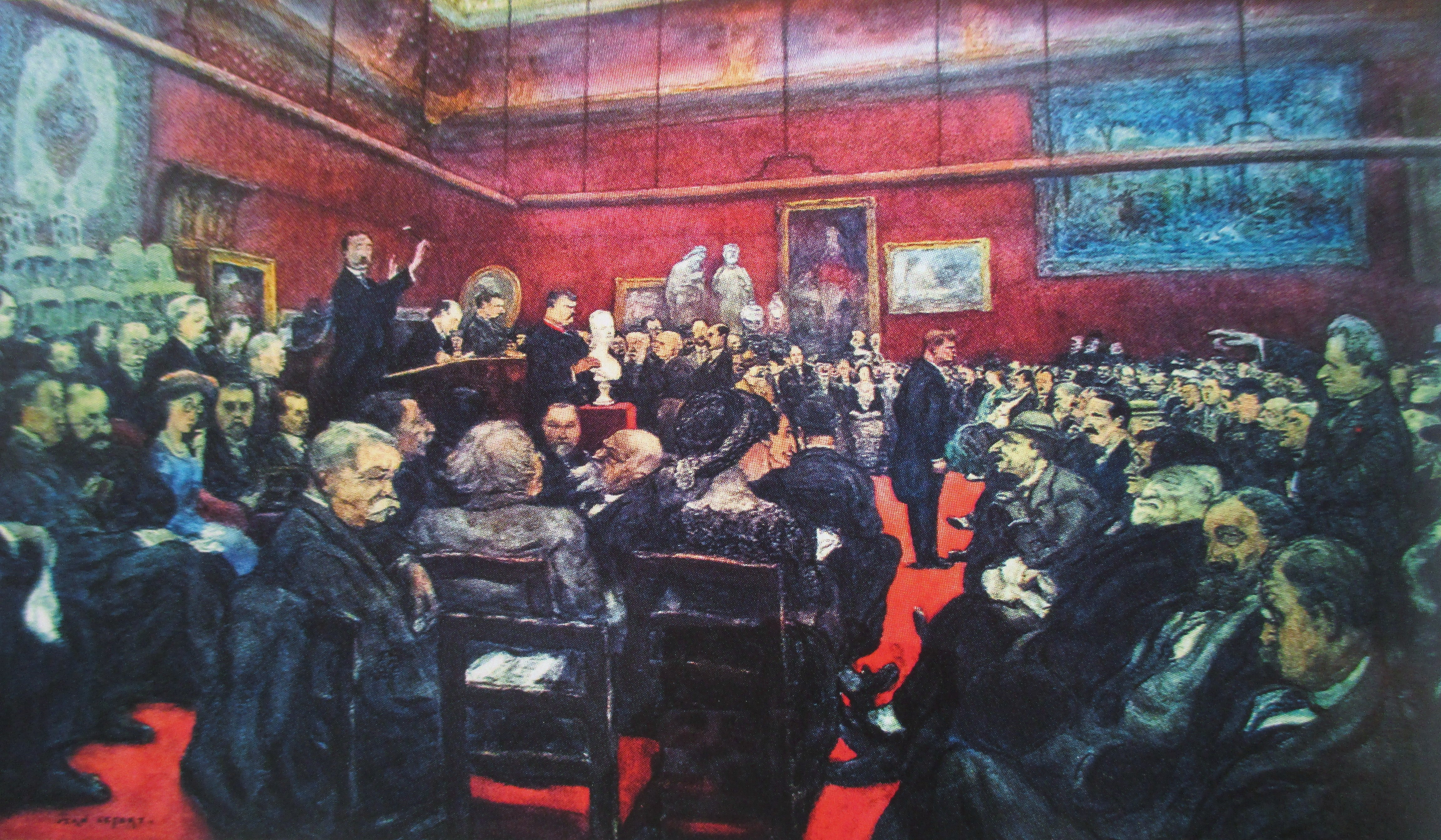 L’intérieur de l’hôtel Drouot lors d’une vente dirigée par Me Lair-Dubreuil, par Jean Lefort. Dans l’assistance, le marchand d’art Georges Petit et, à droite, le critique d’art Félix Fénéon